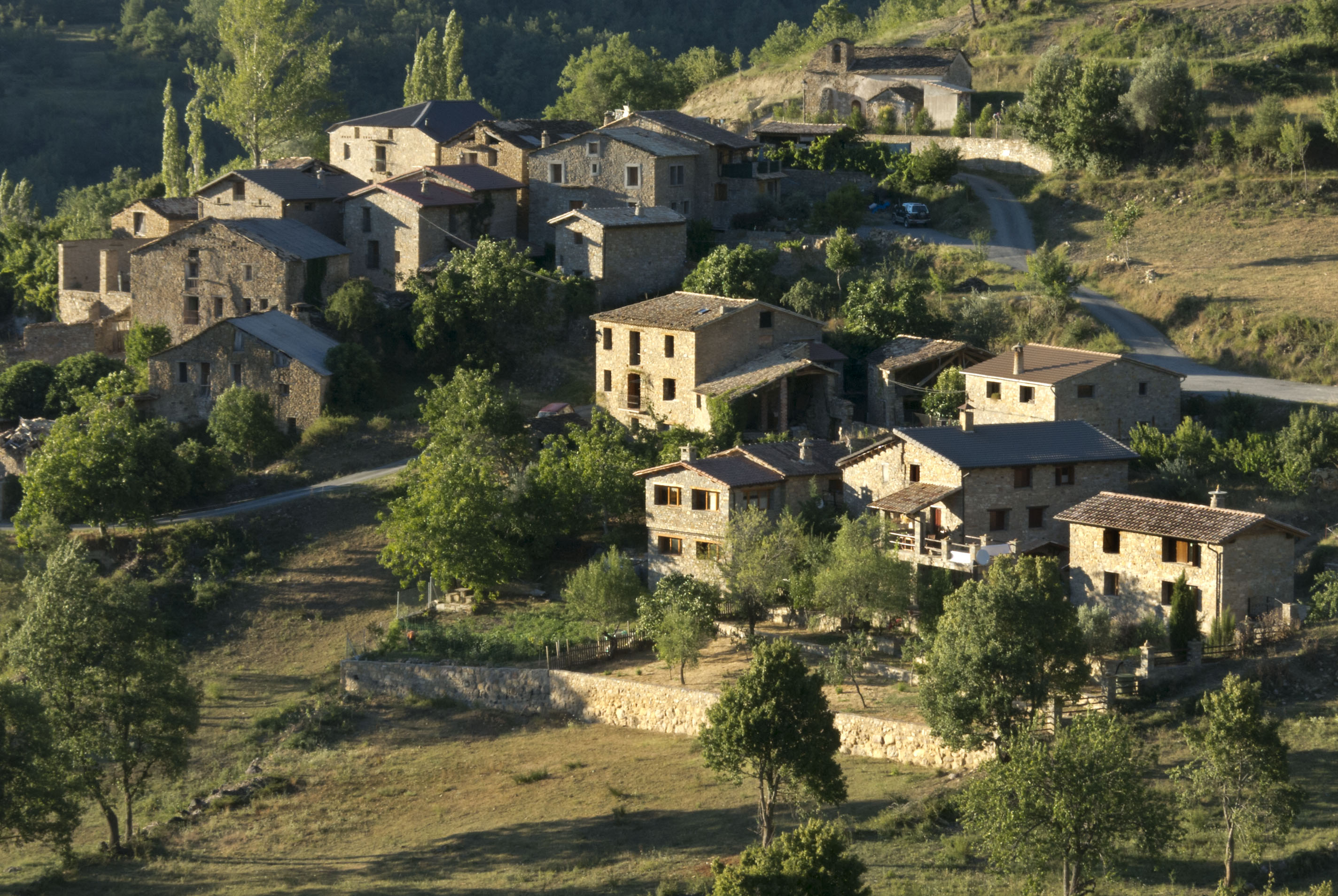 Poble del municipi de Beranui, situat dalt del riu Isàvena, a la serra de Sis de la Baixa Ribagorça aragonesa. A 925 metres d'altitud sobre el nivell del mar.